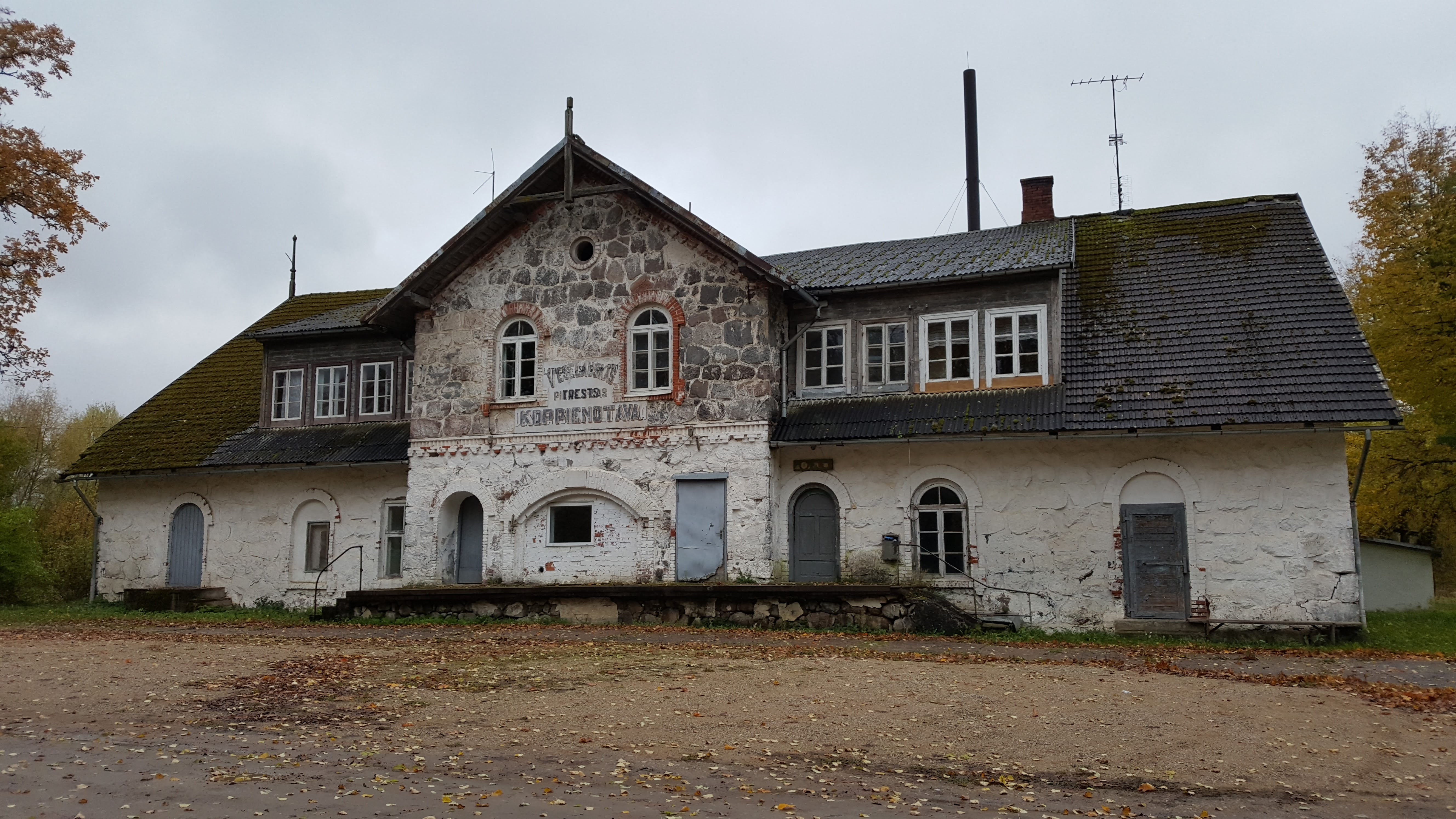 Veselauska mõisa sõiduhobuste tall.